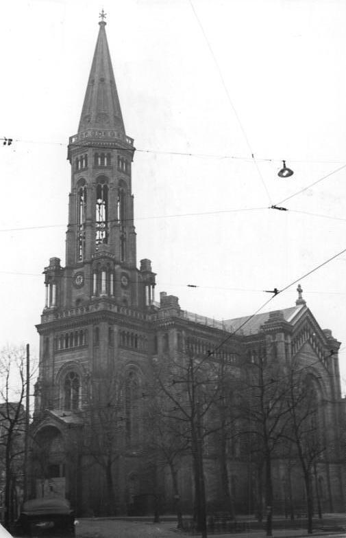 Illus Martin 7.12.51 Kirchen im demokratischen Sektor. Auf Einladung der Landesleitung der evangelischen Kirche Berlin-Brandenburg wurde am 7.12.51 eine Pressebesichtigungsfahrt veranstaltet, um die Kirchen im demokratischen Sektor zu besichtigen. An der Fahrt nahmen auch Pressevertreter aus Westberlin und Westdeutschland teil. UBz: Die Zionskirche erhielt einen neuen Dachstuhl.